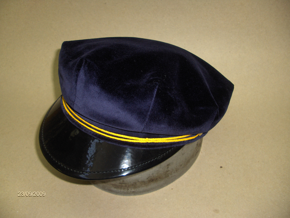 Czapka_studencka_WPIA_UJ